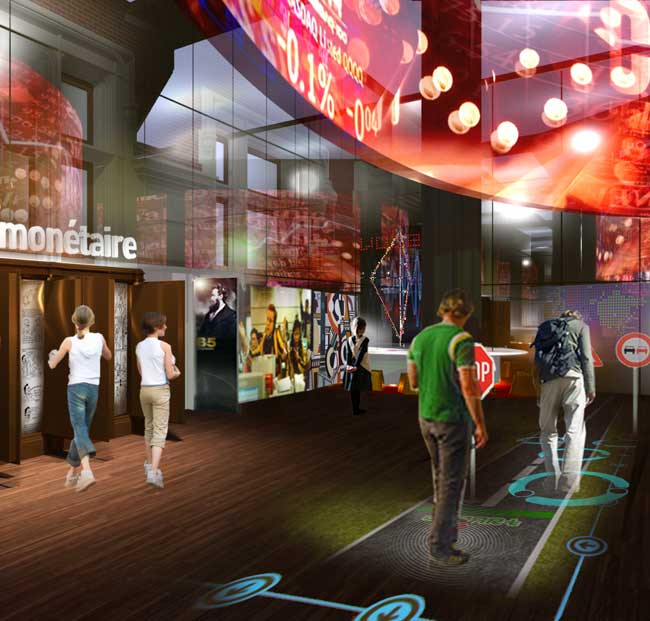 Salle du conseil - Boardroom Image du concours architectural et muséographique, 2011.